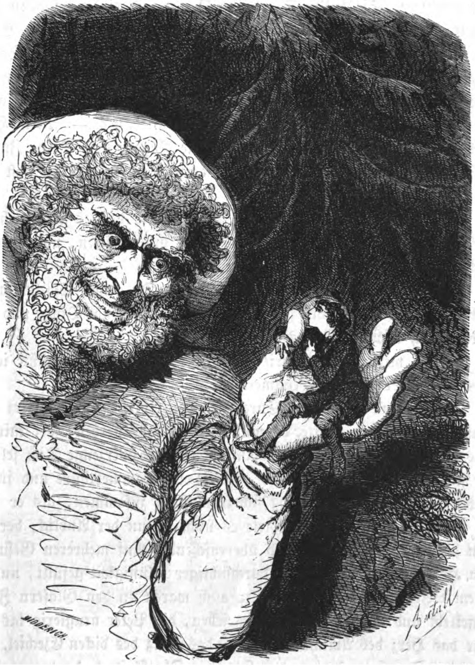 Szene aus dem Märchen Das kalte Herz von Wilhelm Hauff: Der Köhler Peter in der Hand des Holländer-Michels